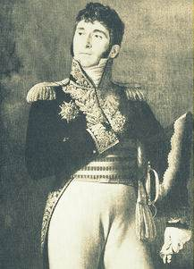 Le baron Joachim Jérôme Quiot